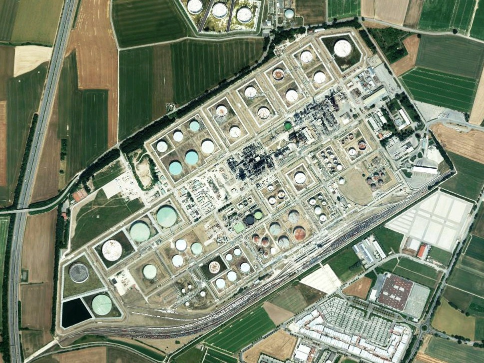 Luftaufnahme der Bayerischen Vermessungsverwaltung: Gunvar-Raffinerie Ingolstadt